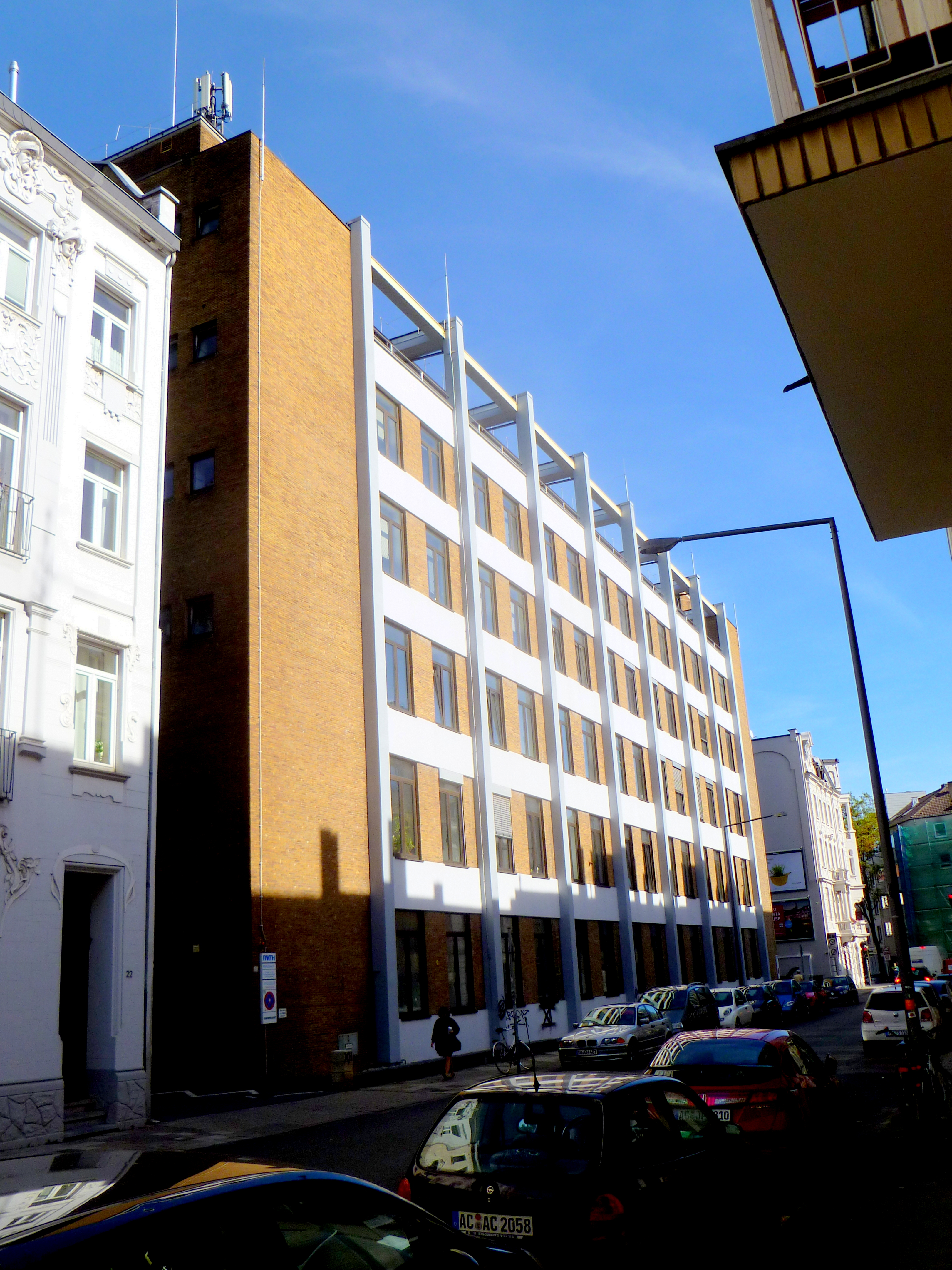 ehem. Tuchfabrik Lochner in der Lochnerstraße in Aachen, Baudenkmal